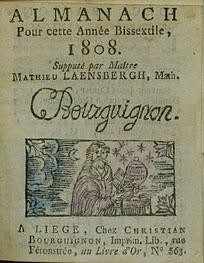 image extrait de l'Almanach des bergers.